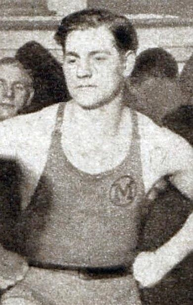 Pierre Alleene, champion de France d'haltérophilie en mars 1933, poids moyen (moins de 75kg).